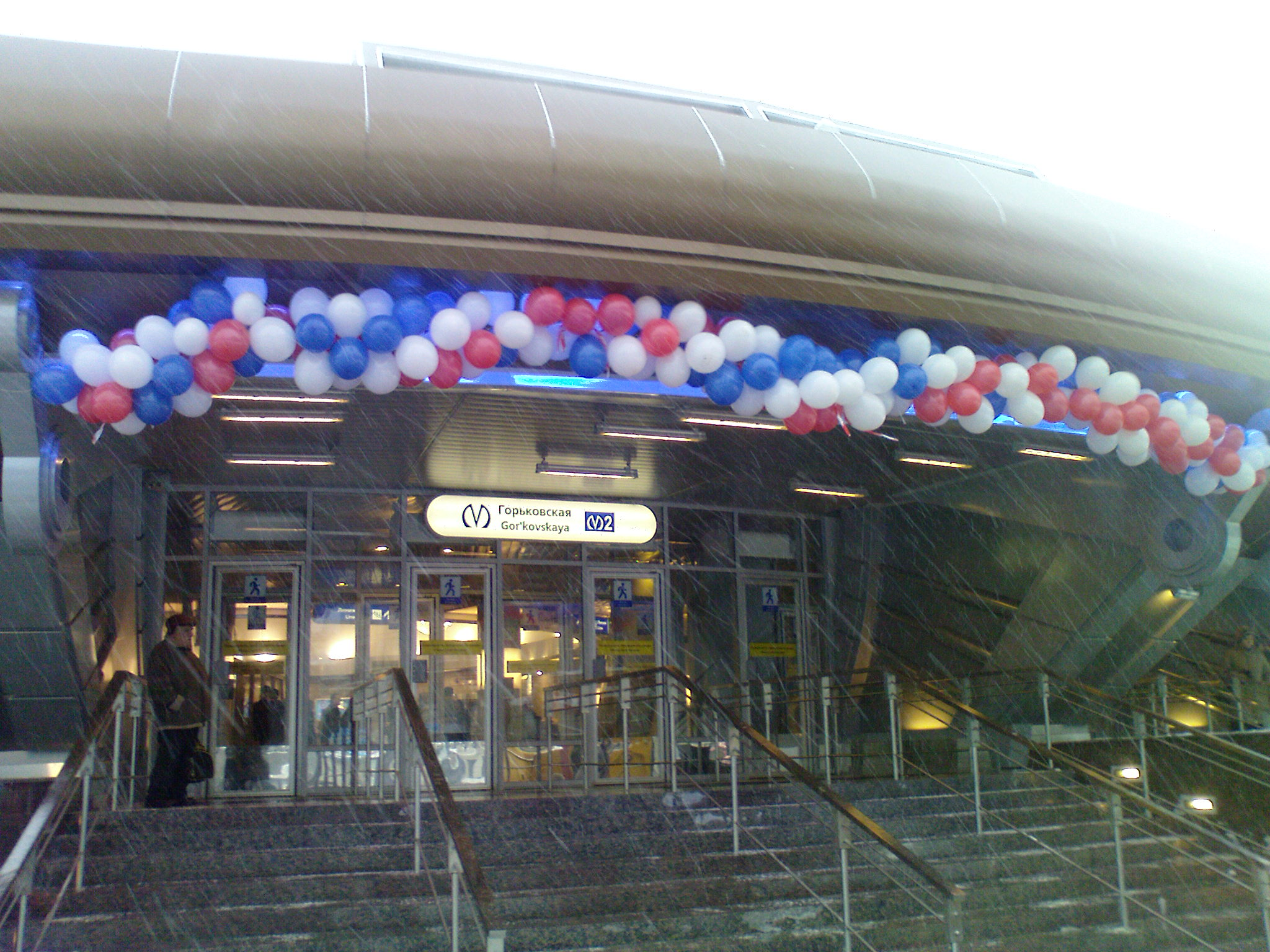 Вестибюль станции "Горьковская" в день ее открытия.